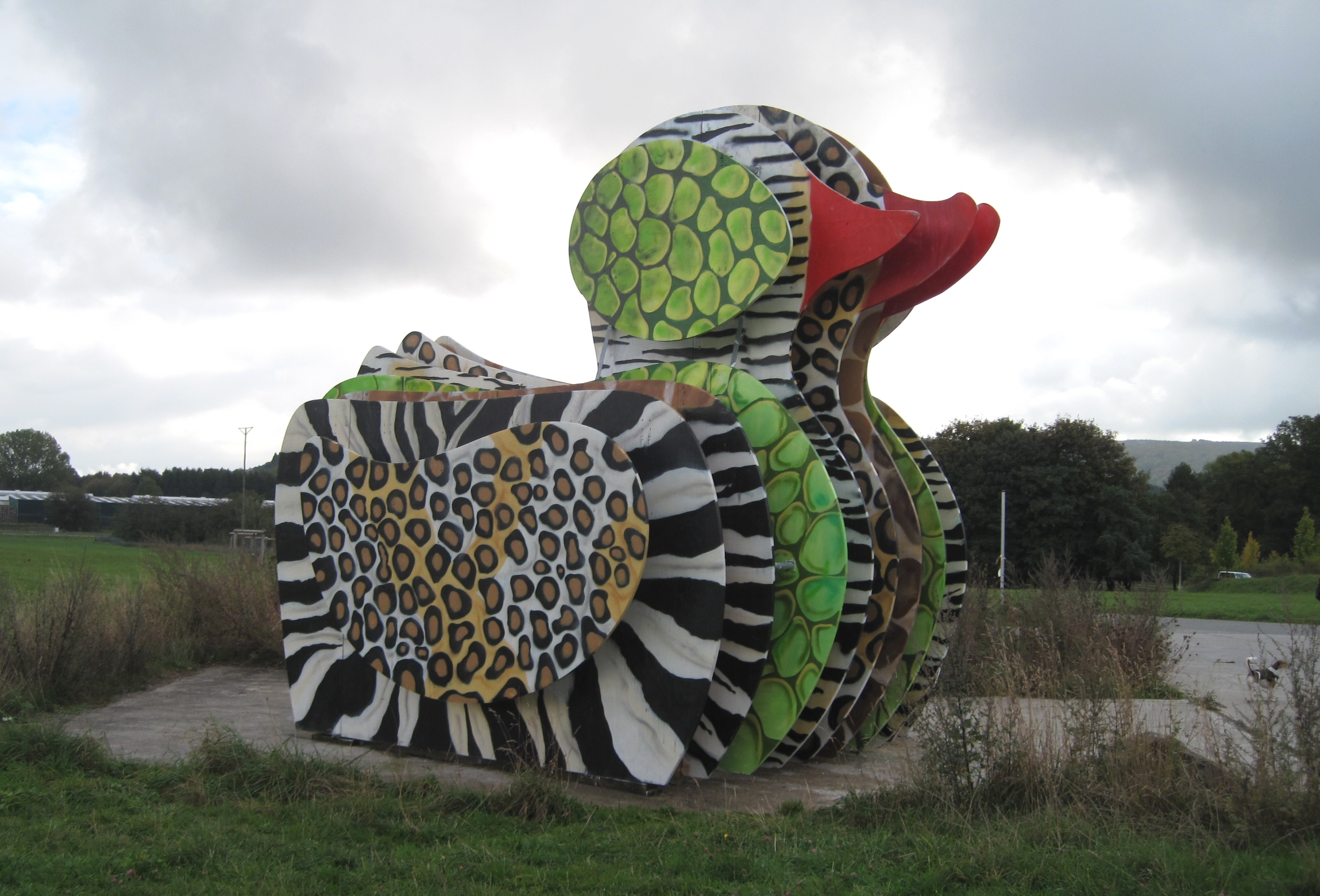 Entenskulptur am oberen Parkeingang (Deilinghofen) des Sauerlandparks in Hemer. Die Holzente stand 2008 auf der Landesgartenschau Bingen auf der 600 Quadratmeter großen Ausstellungsfläche von Landesforsten Rheinland-Pfalz. Dort symbolisierte sie, noch gelb bemalt mit rotem Schnabel, die Artenvielfalt der Tier- und Pflanzenwelt in den wasserdominierten Wäldern in Rheinland-Pfalz.